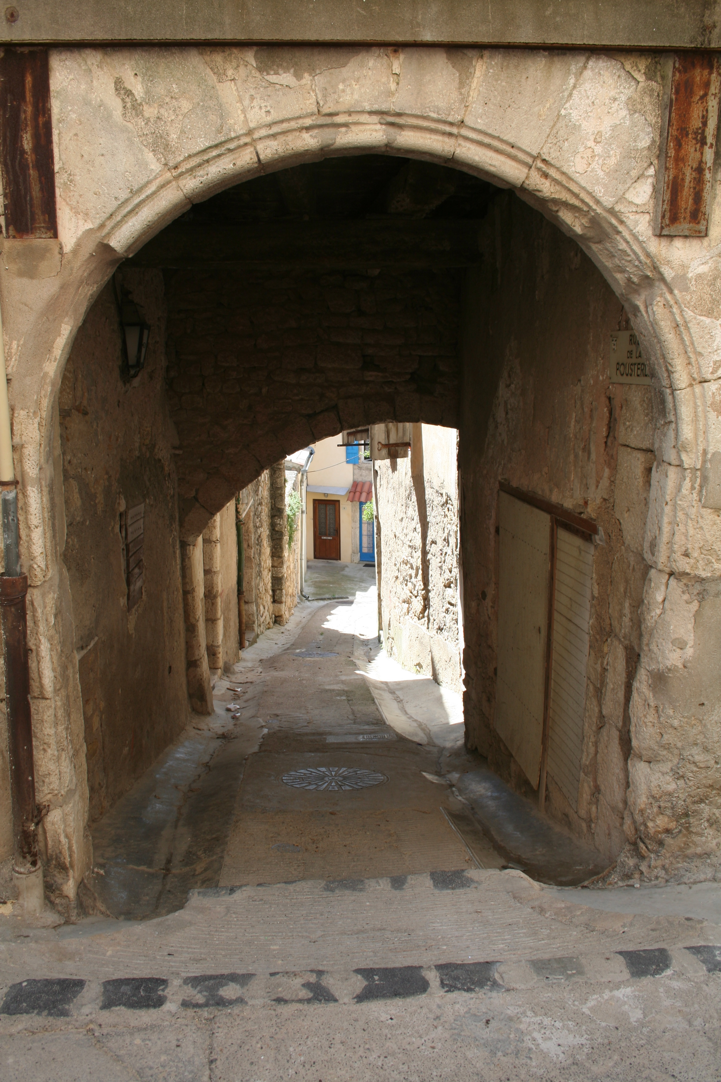 Magalas (Hérault) - rue de la Pousterle.